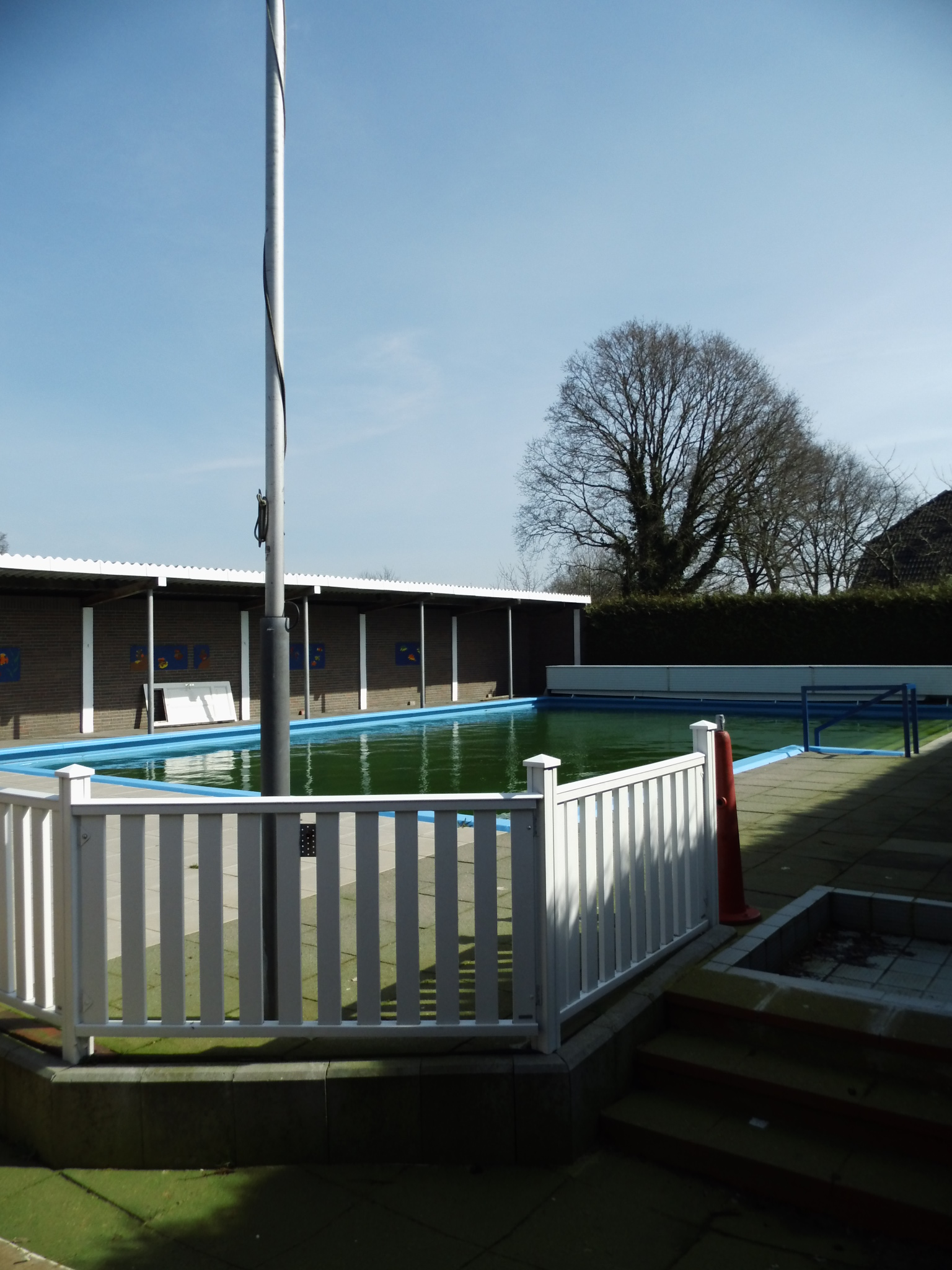 Ardorf Stadt Wittmund, Landkreis Wittmund, Niedersachsen, Deutschland